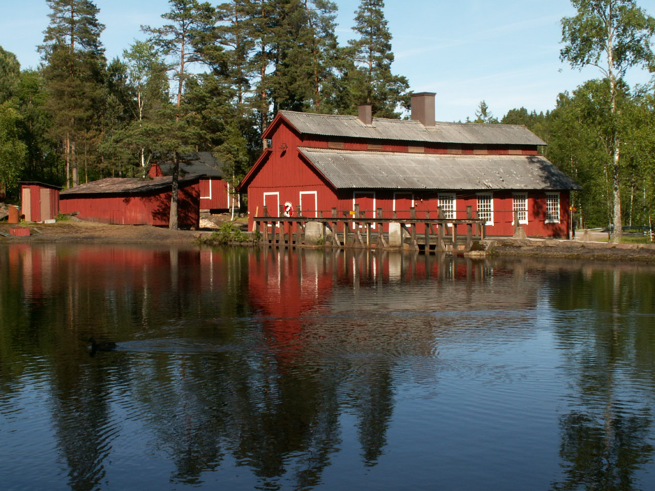 Gjuteriet vid Hyltens industrimuseum. Gnosjö, Gnosjö